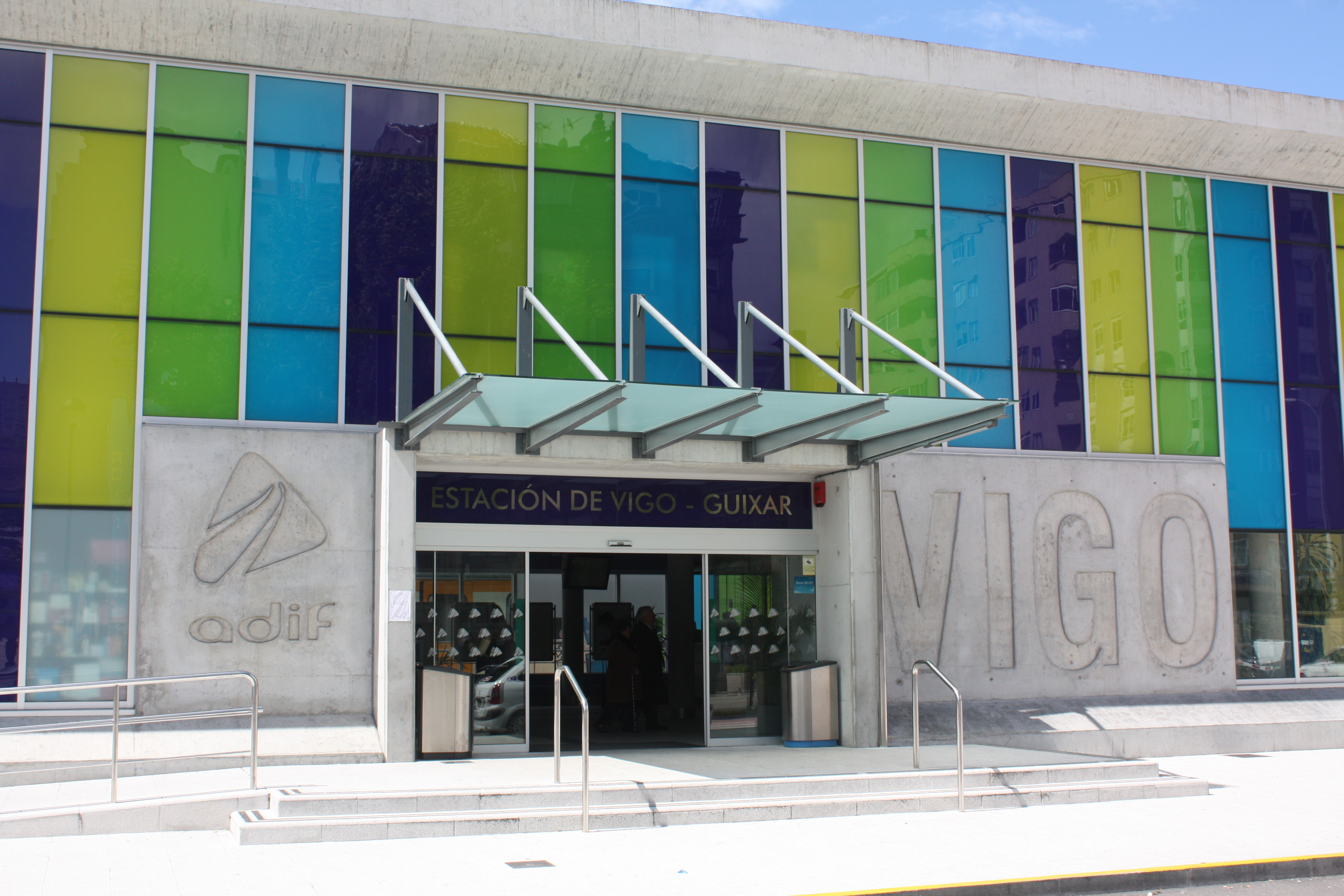 Estación de Guixar (Vigo)